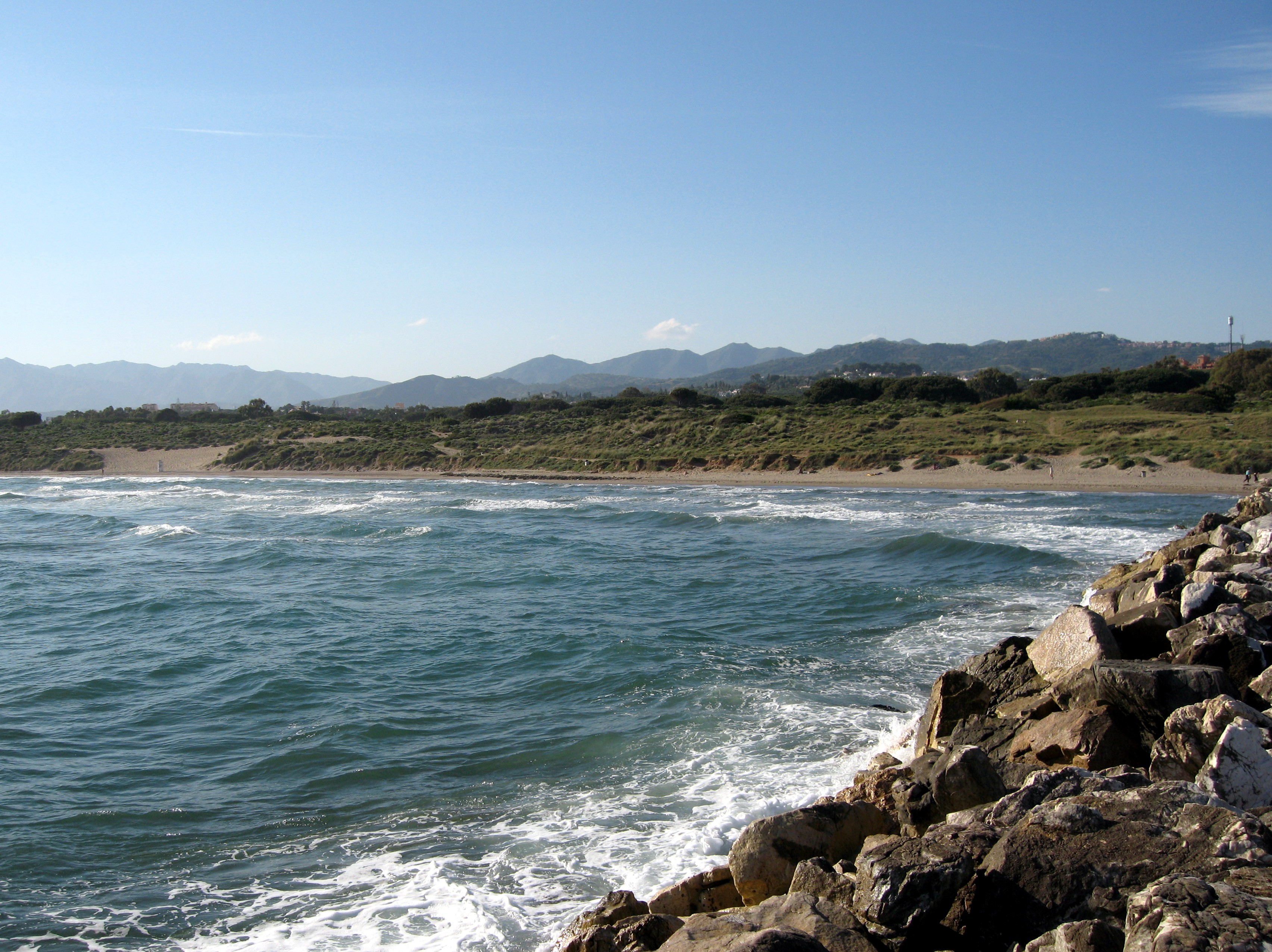 Strand von Cabopino, Ortsteil von Marbella, Provinz Málaga, Andalusien, Spanien